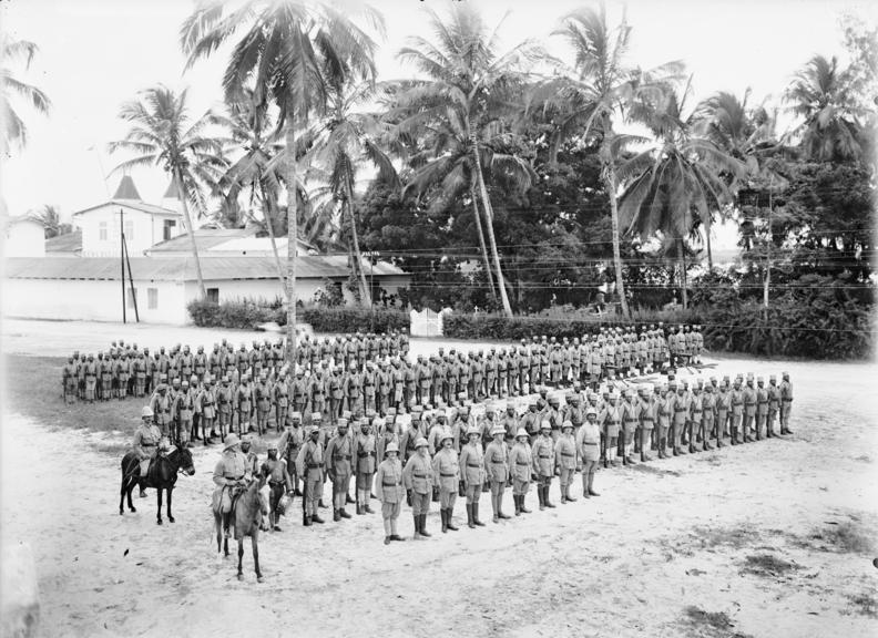 Askarikompanie fertig zum Abmarsch